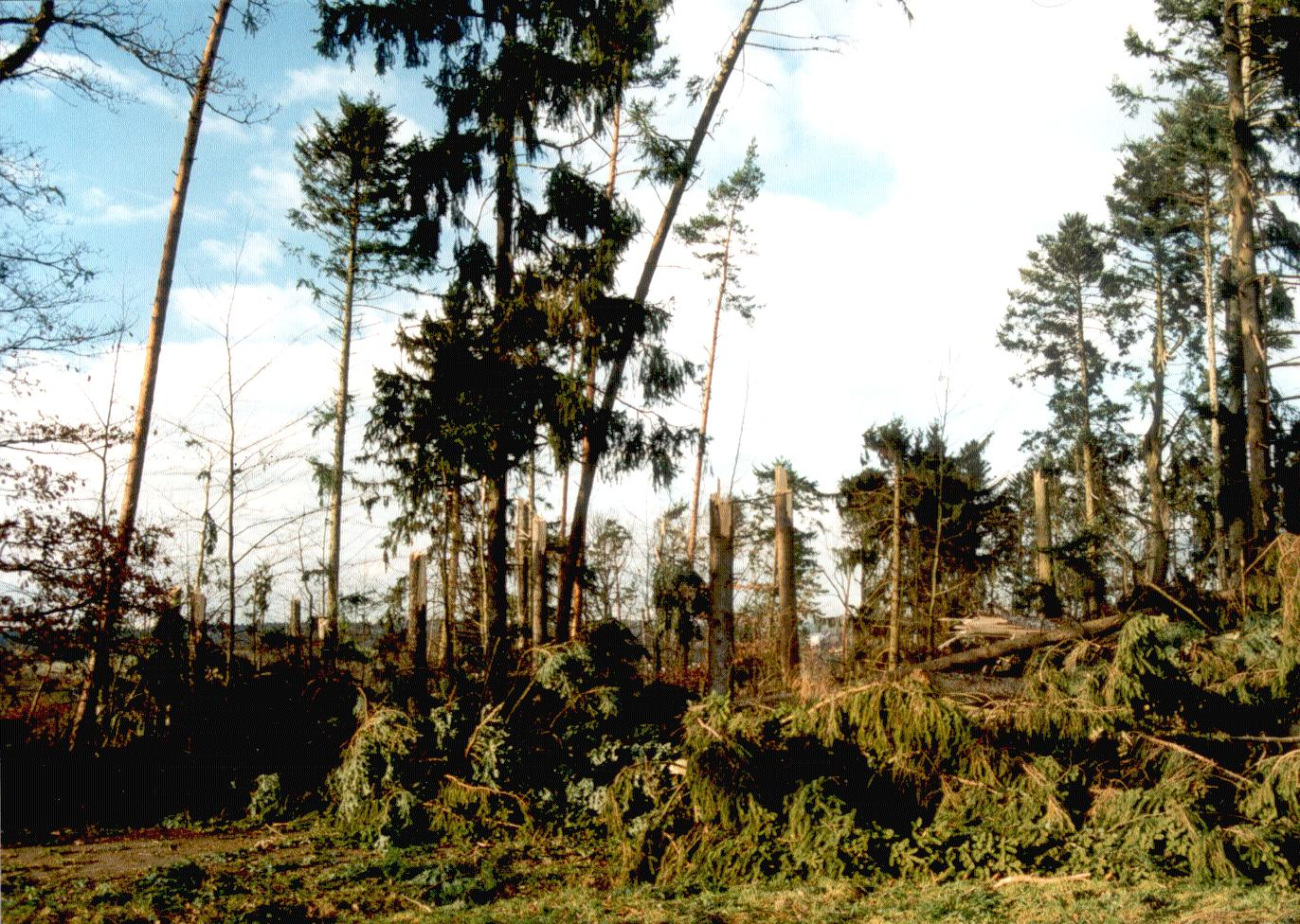 Sturmbruch im Bästenhardtwald bei Mössingen.